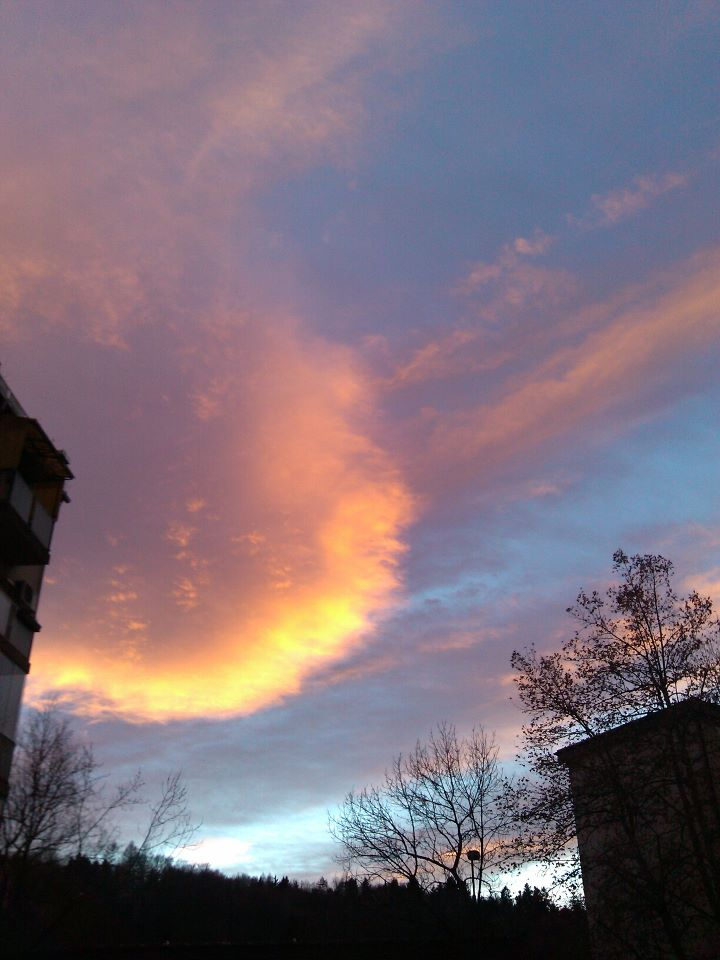 nebo